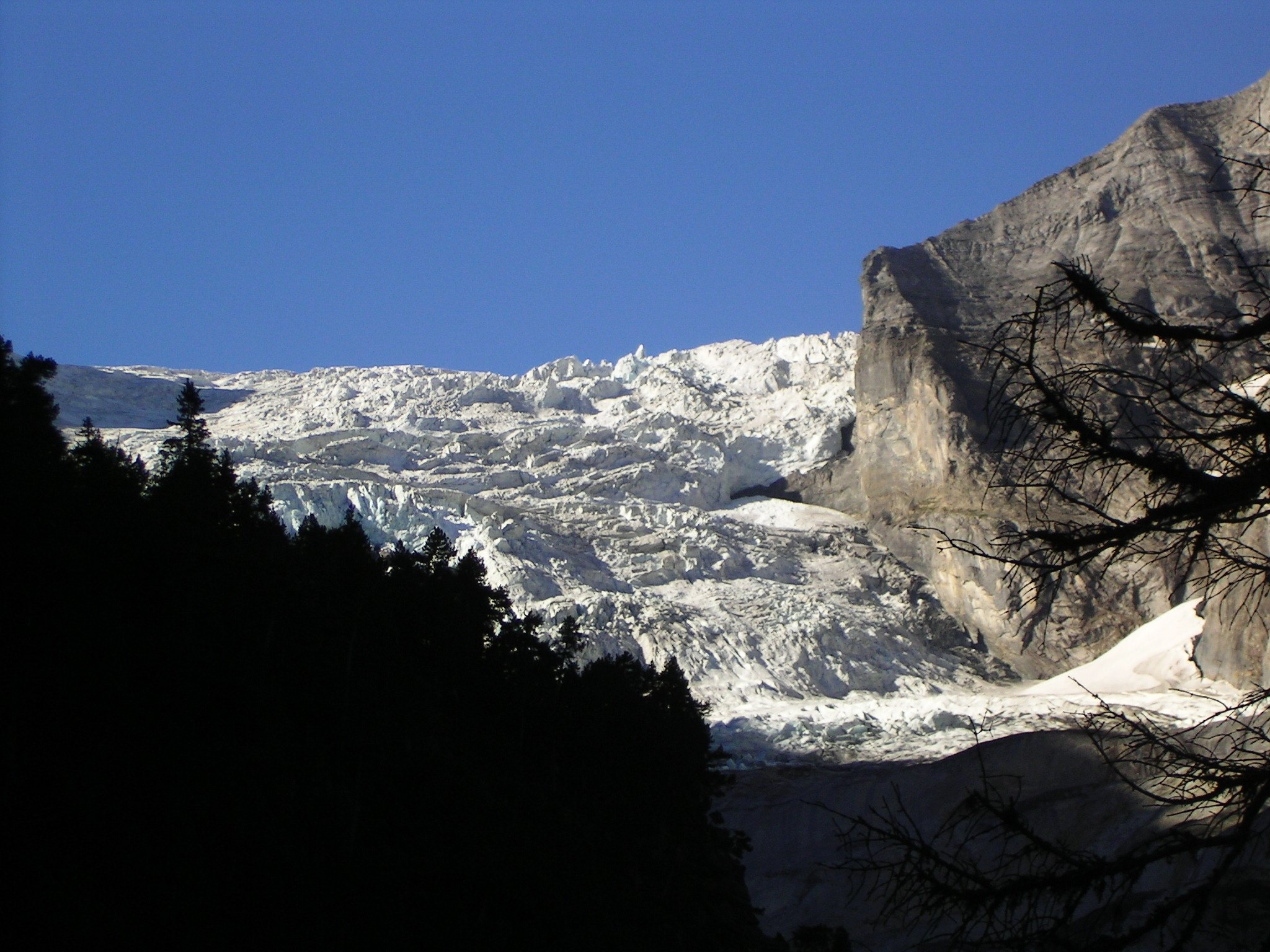 (en) Rosenlaui glacier (de) Rosenlauigletscher Aufnahmeort: Rosenlauital, am Morgen. Die Sonne scheint im Rosenlauital erst gegen Mittag! Bearbeitung: GIMP keine